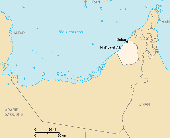 Description:Carte de l'émirat de Dubaï,Emirats arabes unis Auteur:Rémih